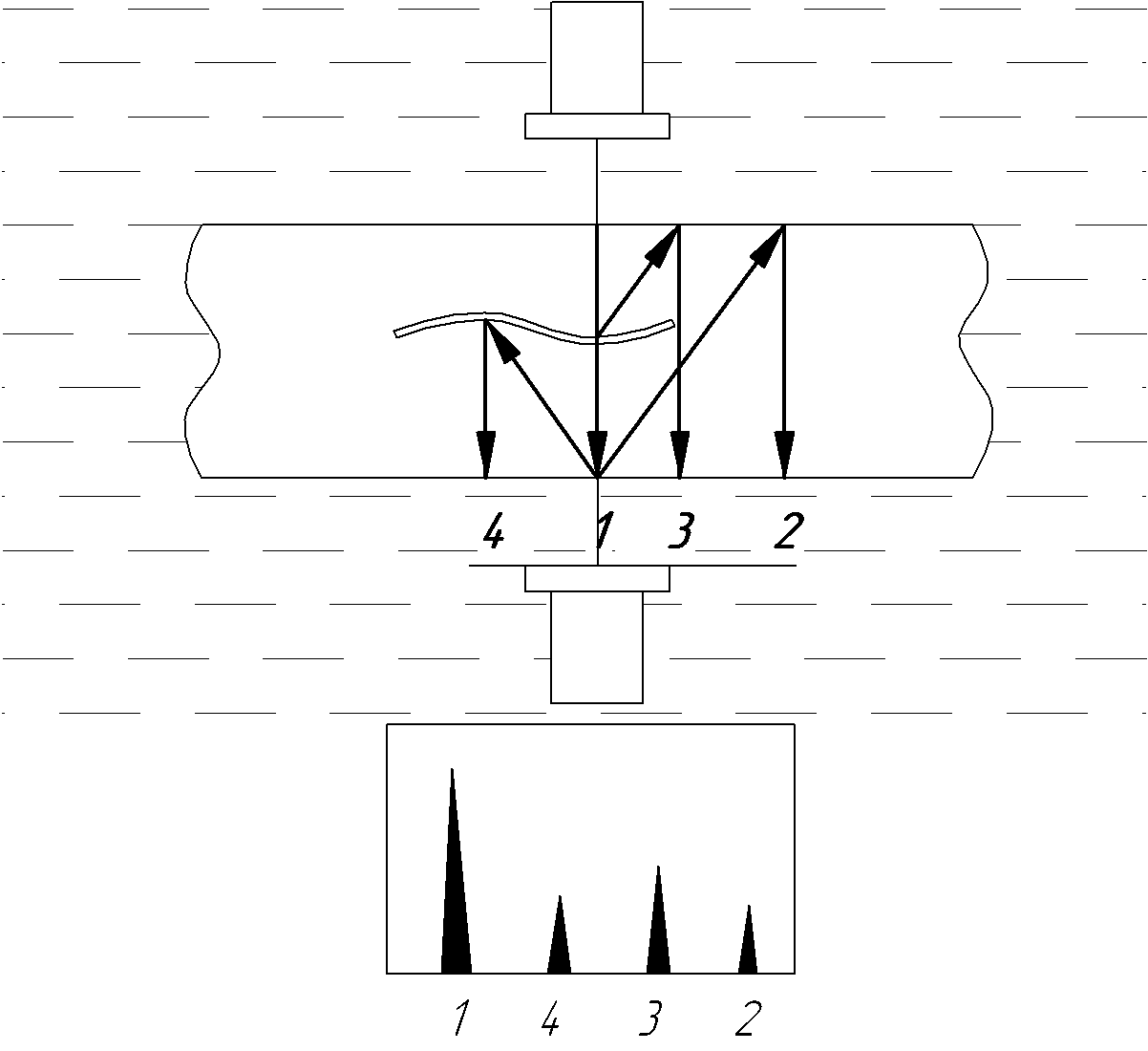 Эхо-сквозной метод исследования